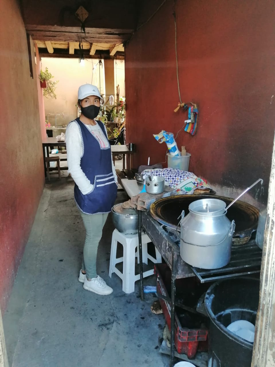 Todos los domingos después de salir de misa, las personas tradicionalmente se trasladan a tomar su morochito respectivo.